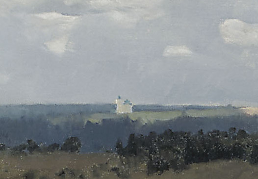 Левитан. Владимирка. Версия без рамки.